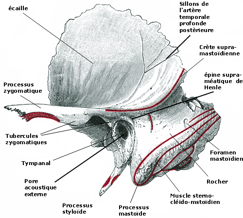 Left temporal bone. Outer surface.